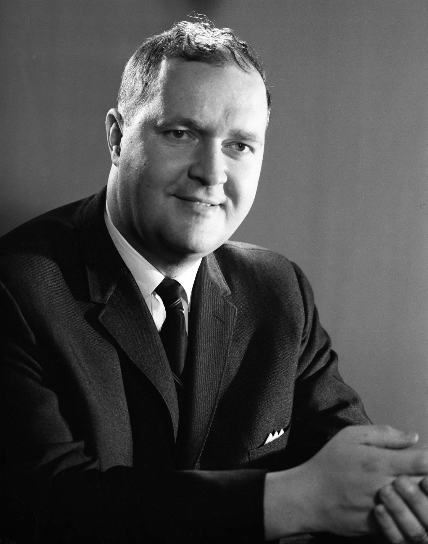 Portrait photographique d’André Barbeau